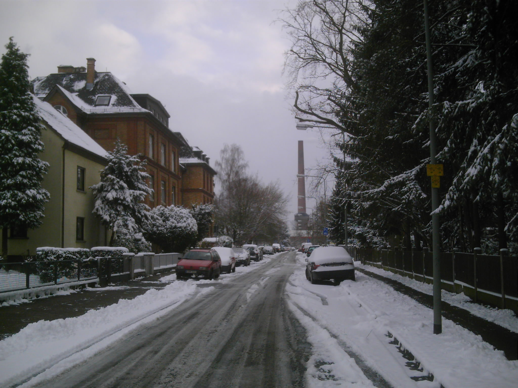 selbst aufgenommen